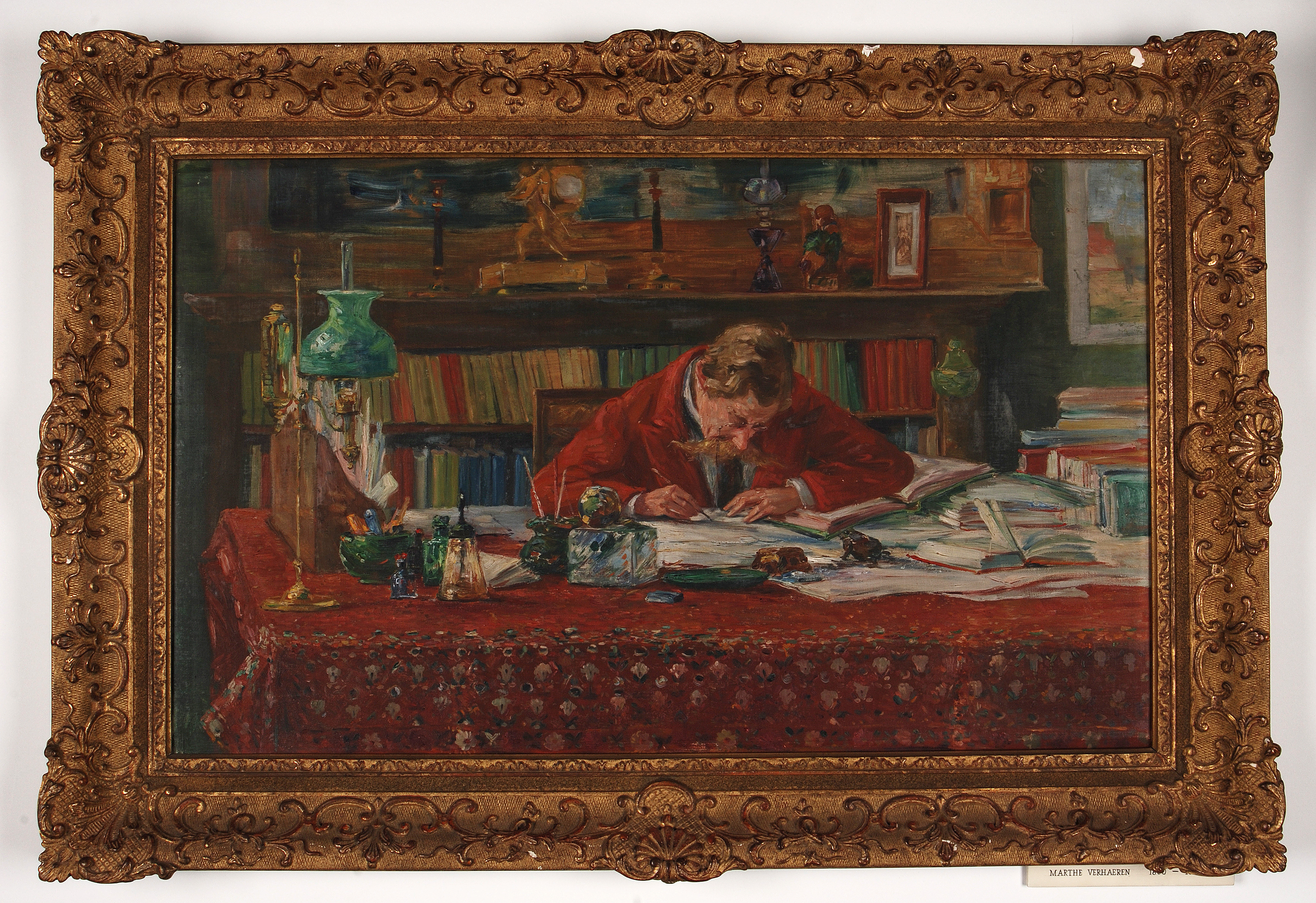 schilderij ( Marthe Verhaeren ( Museum Plantin-Moretus